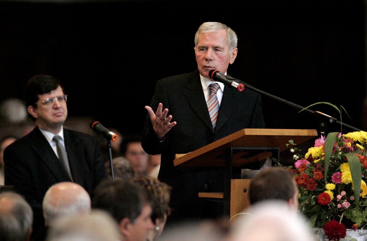 Gyula Horn bei der Preisverleihung zum ersten Memminger Freiheitspreis 1525.